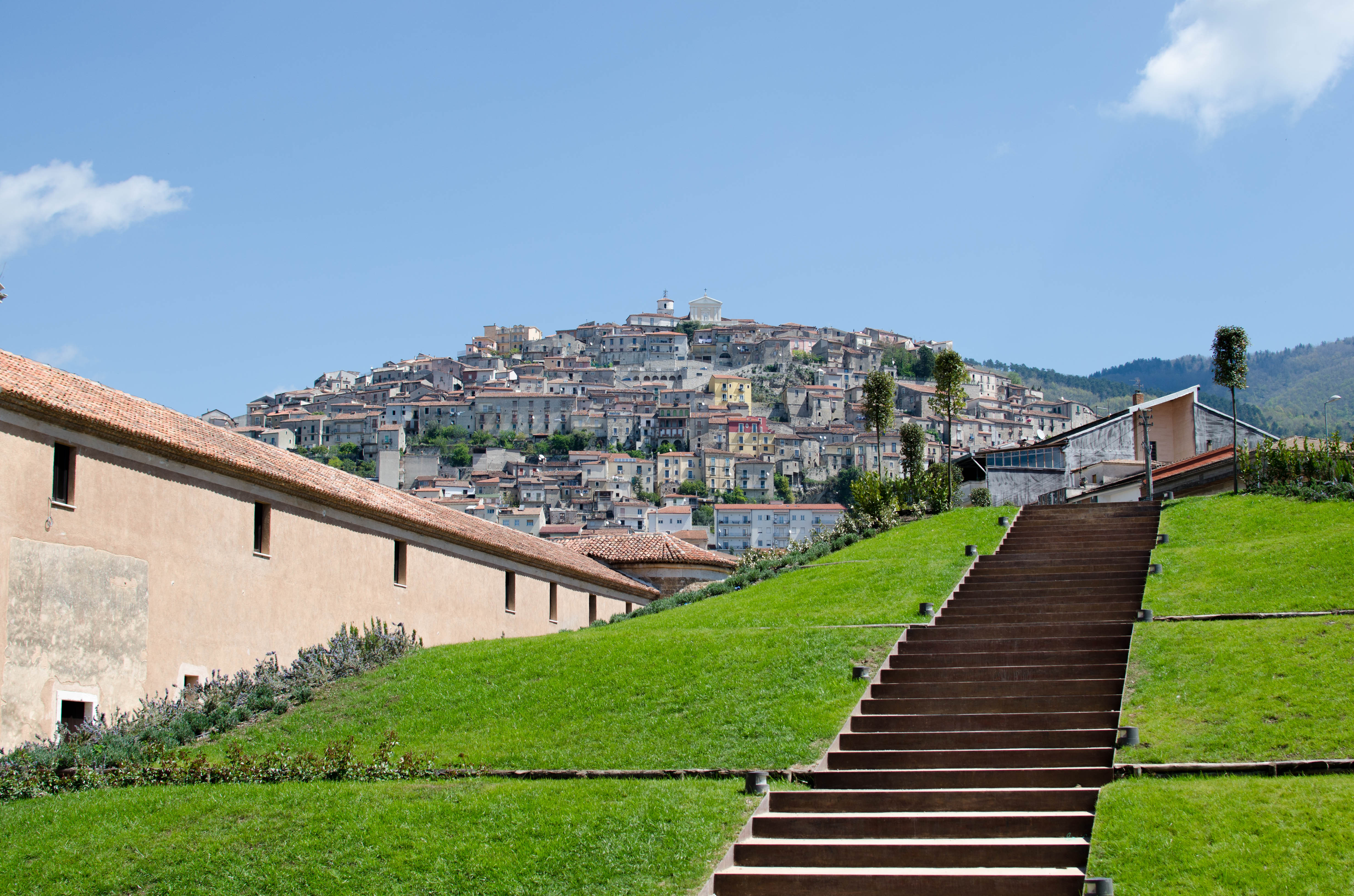 Padula